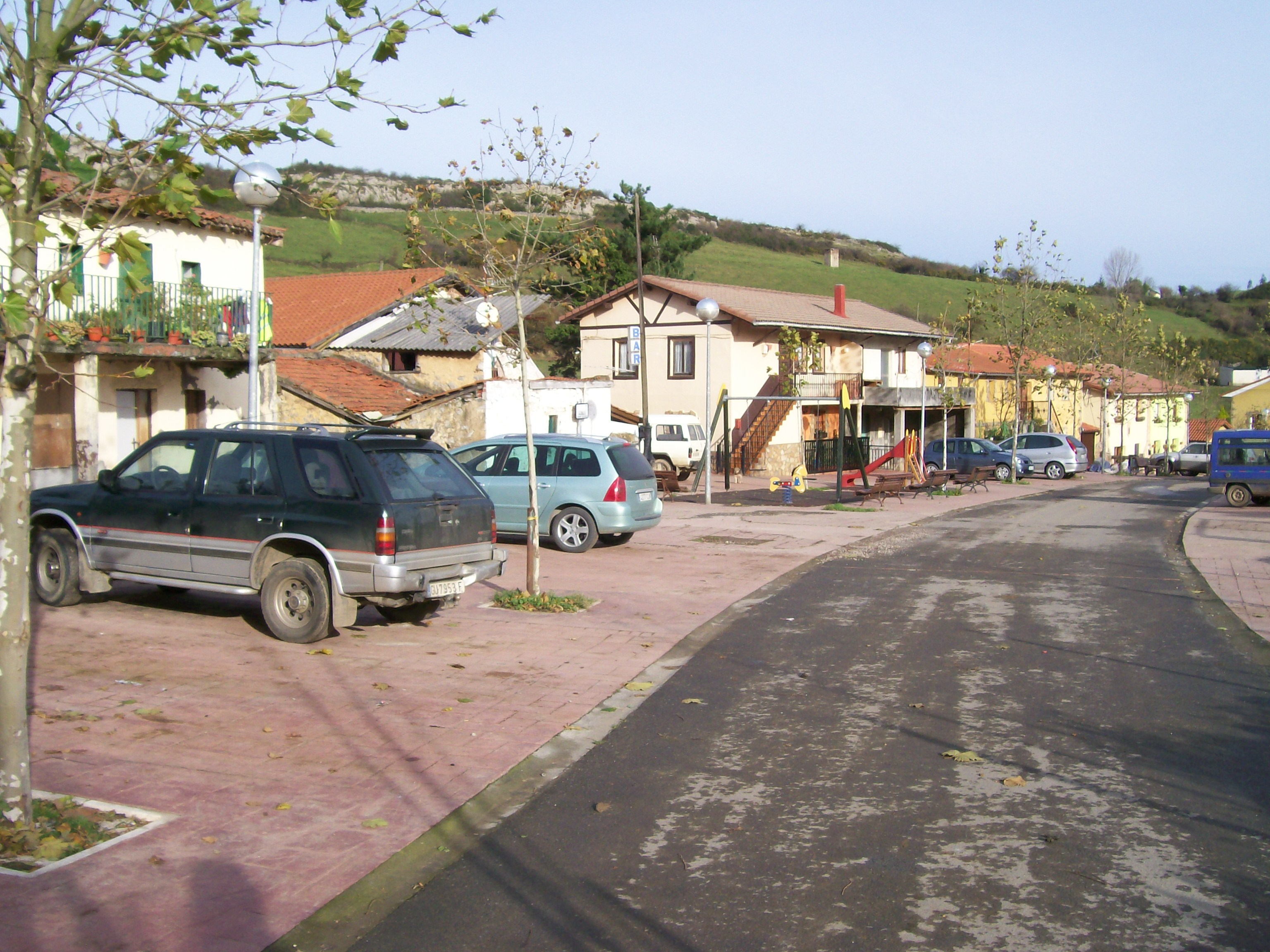 Abanto-Zierbenako Triano auzoko ikuspegia